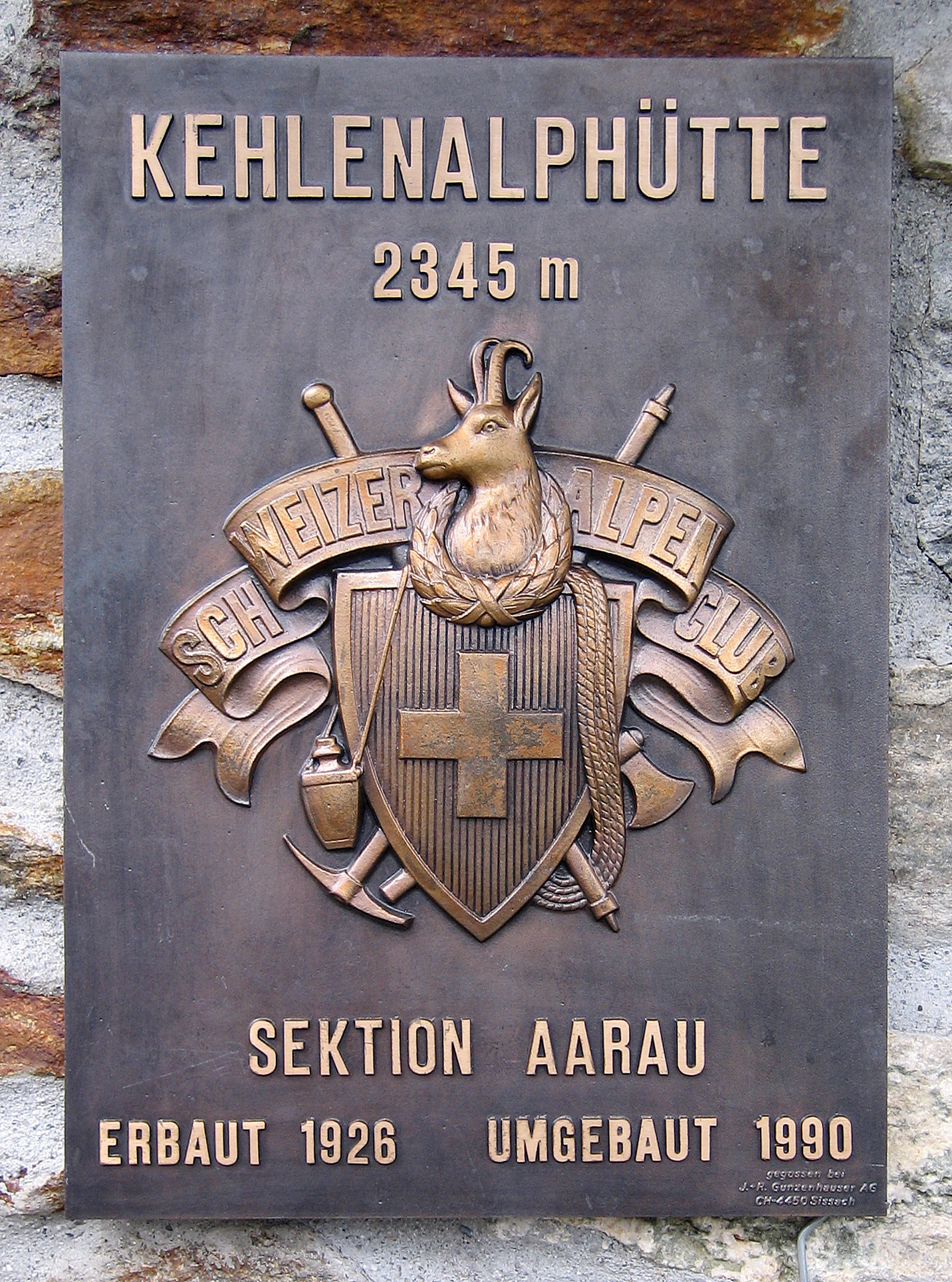 Das Schild an der Kehlenalphütte